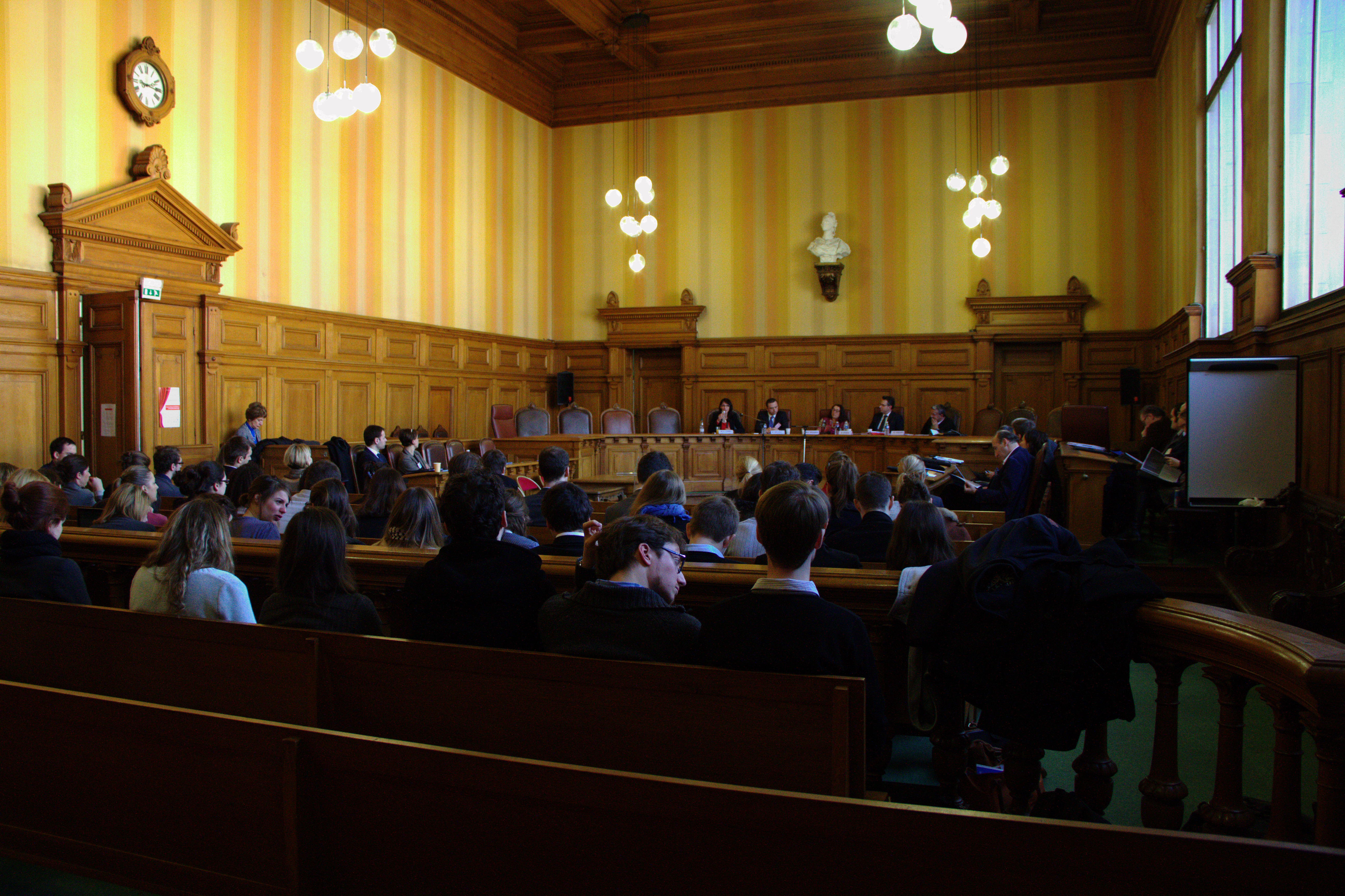 Strasbourg palais de Justice salle de la Cour d'Assises lors de la conférence d’actualité du 5ème concours national de plaidoiries en propriété intellectuelle.